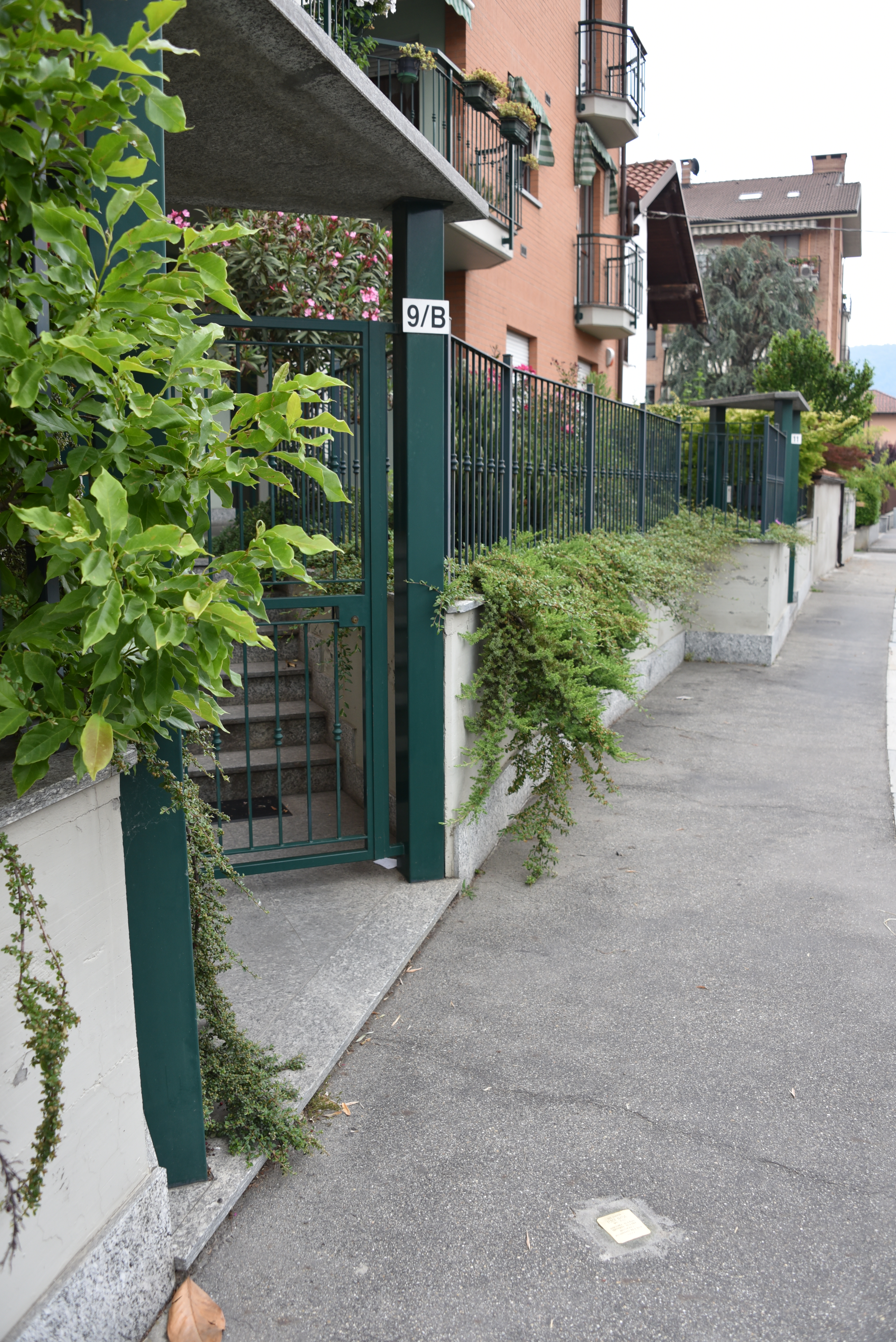 Stolperstein in Turin